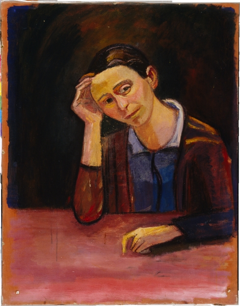 Öl auf Leinwand 87,5 x 68,5 cm Rückseite: "Frau mit aufgestütztem Arm A. B."